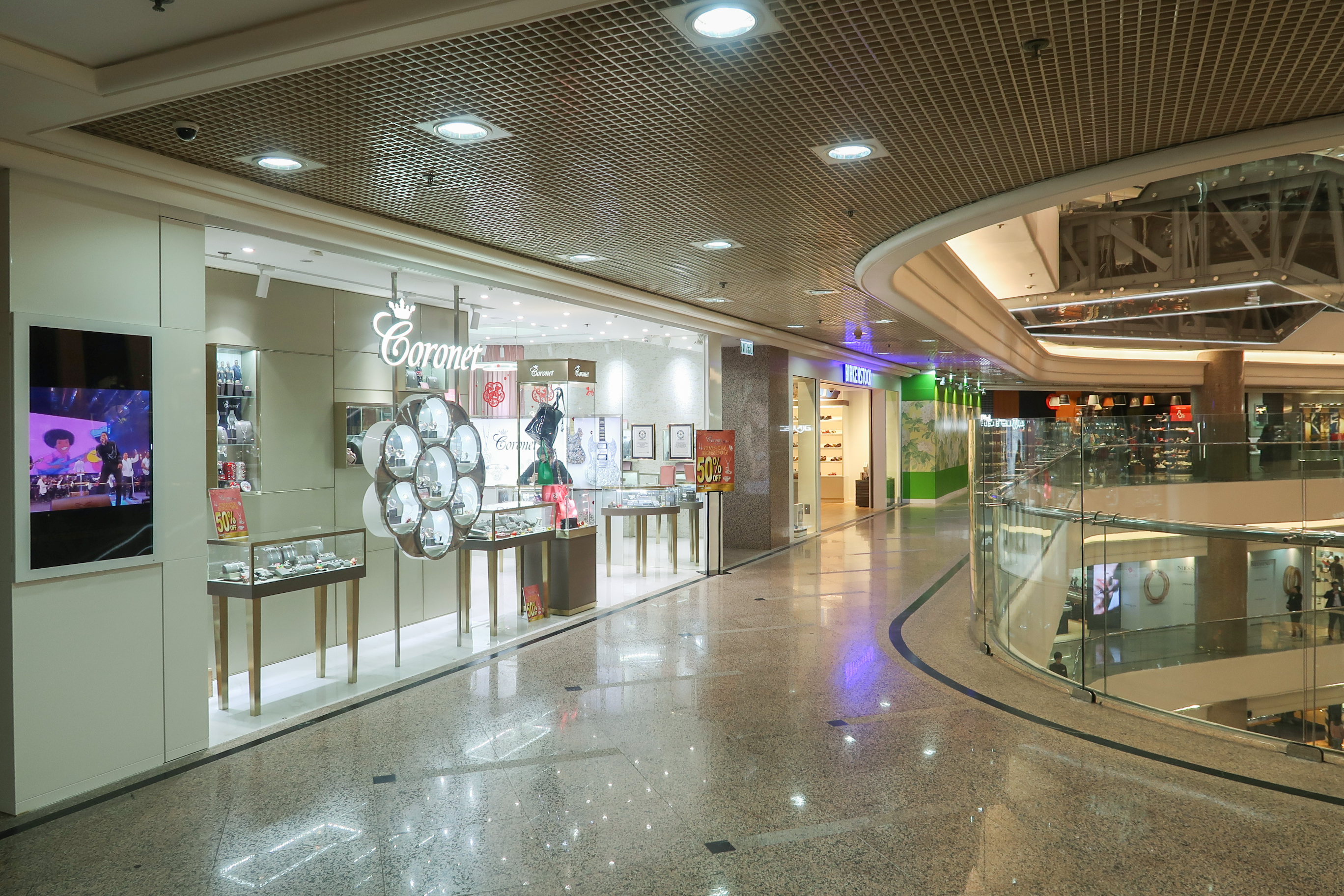 Times Square Level 7